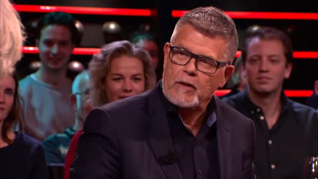 Emile Ratelband eist lagere leeftijd Bekijk hier het hele gesprek: DWDD